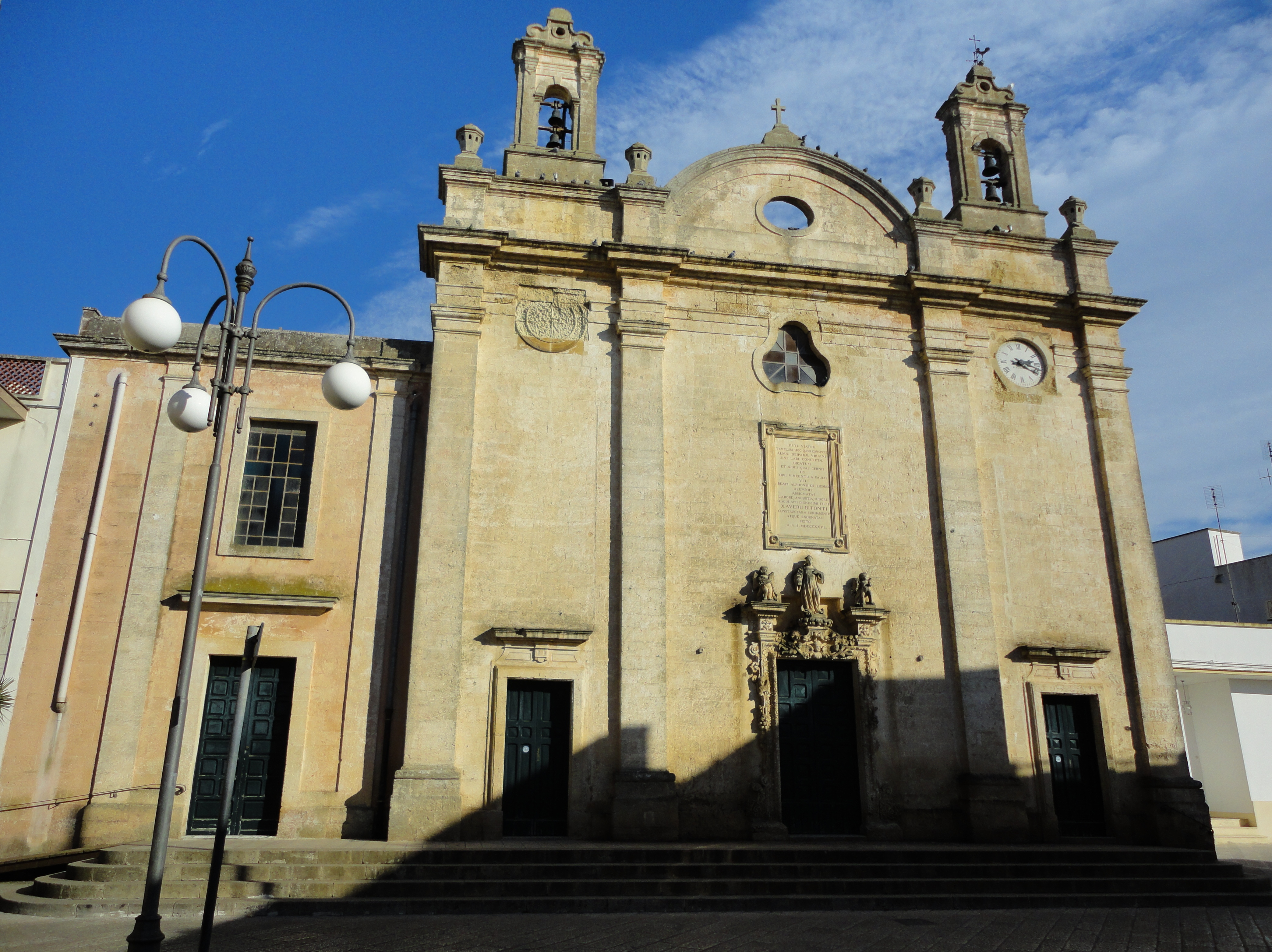 Chiesa Madre di Montesano Salentino, Lecce